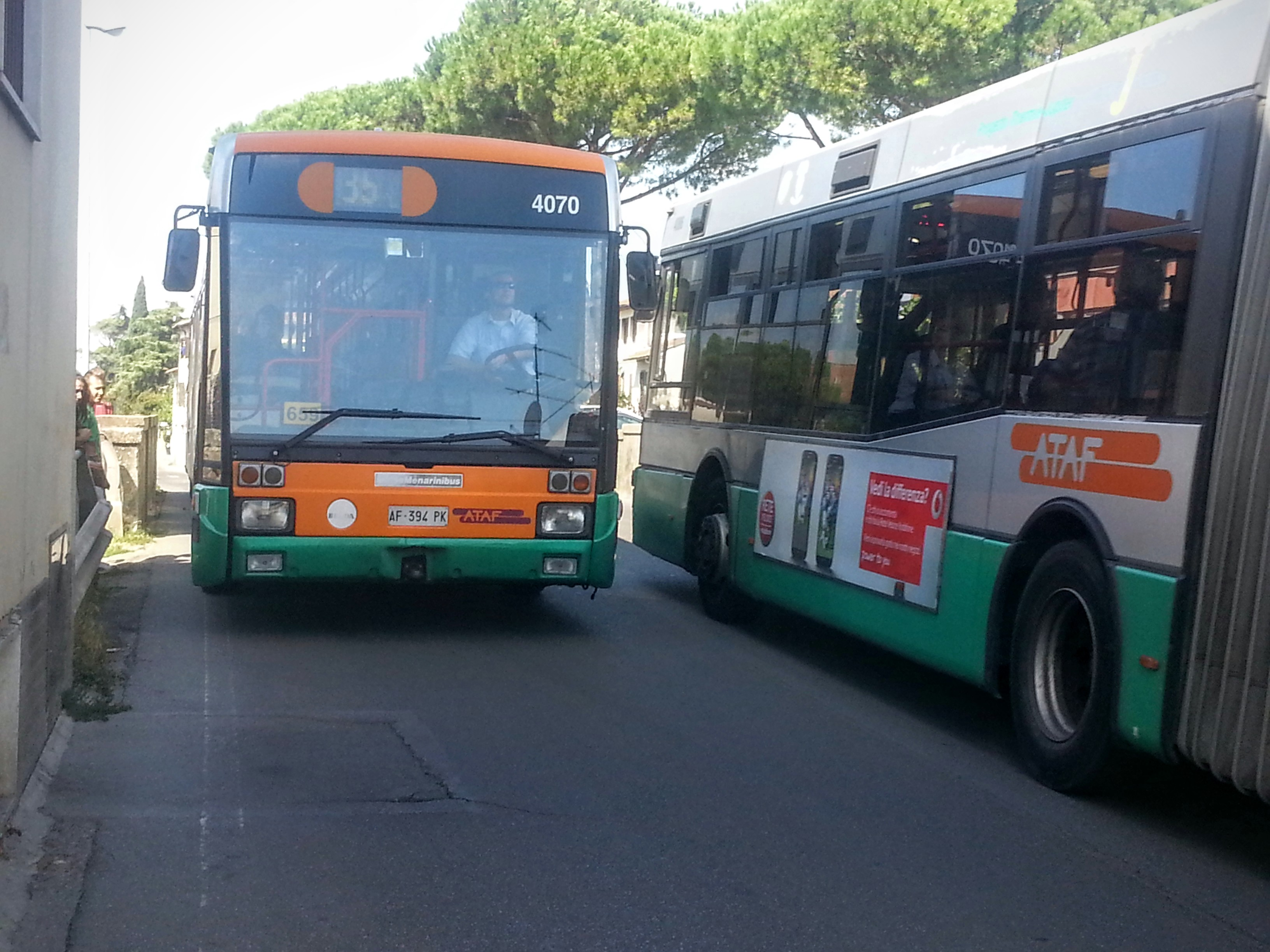 autobus